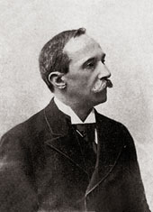 УРУСОВ Лев Павлович Посол России в Австро-Венгрии 1905-1910